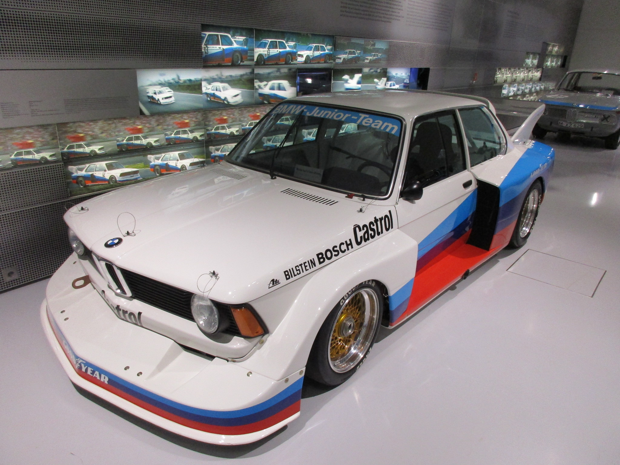 BMW 320 Groupe S 1977